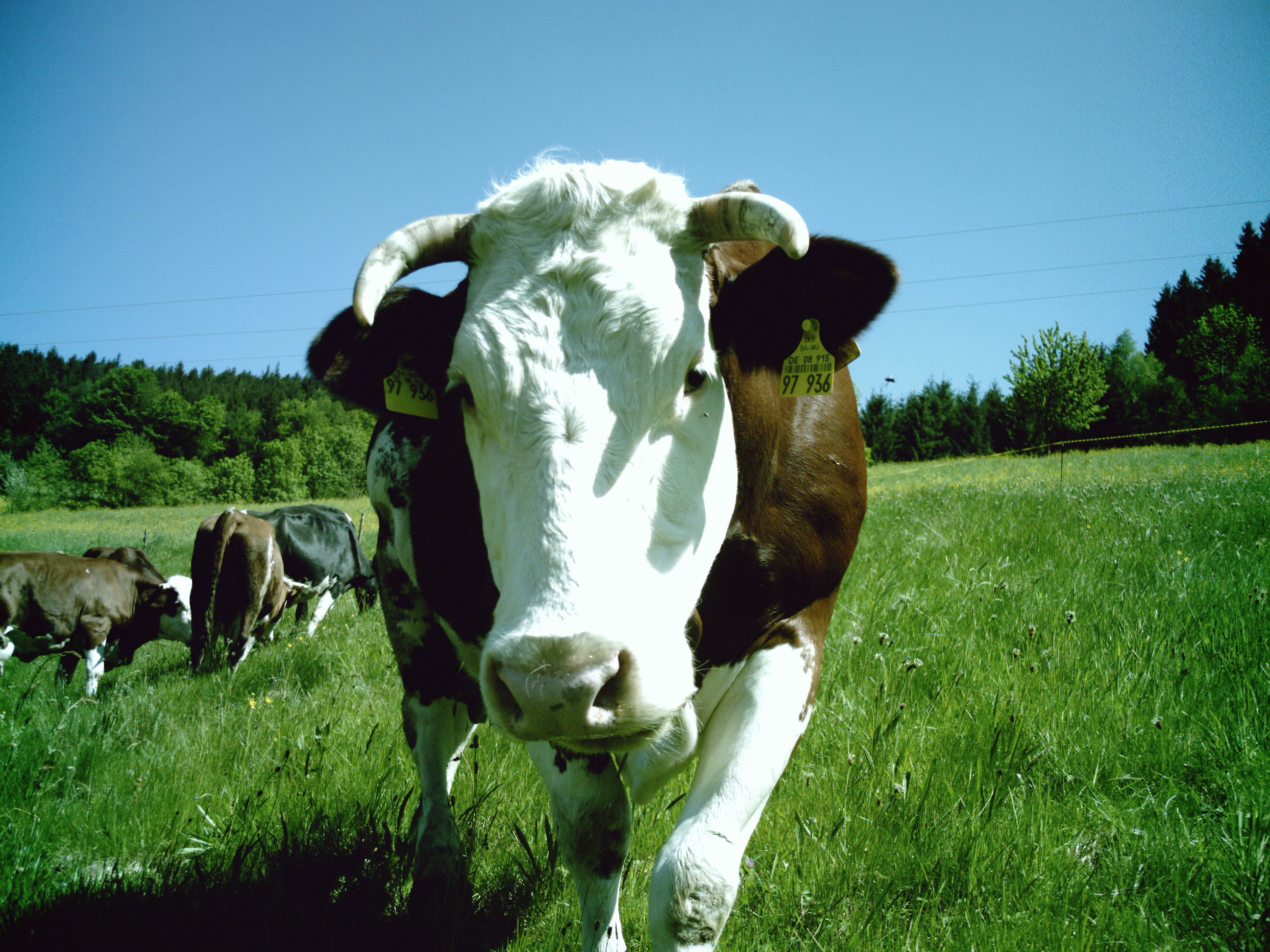 Vorderwälder-Kuh auf der Weide